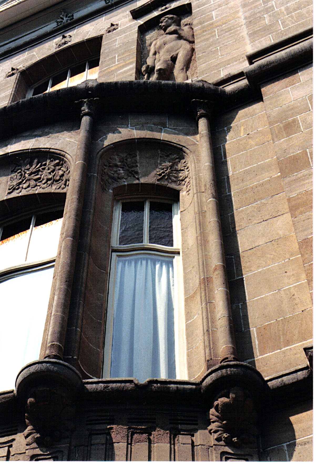 Alphonse Groothaert - Boulevard De Smet de Nayer n° 583-585 à Bruxelles (Art nouveau)